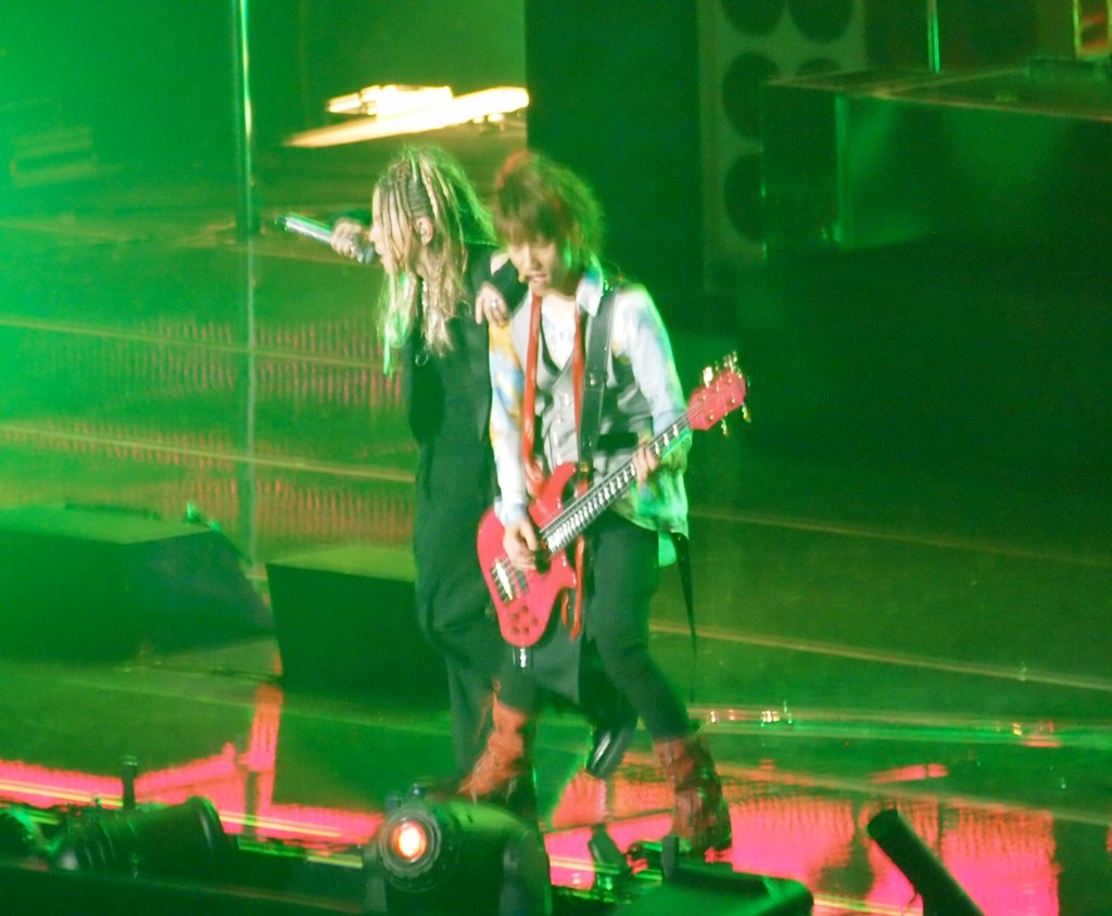 L'arc En Ciel @ MSG - 3/25/12 - 052